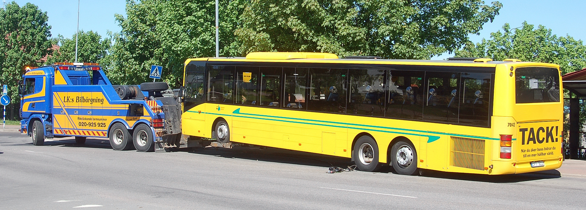 CFT922 VOLVO B12B Färg: GUL Fordonsslag: BUSS Fordonsår: 2010 Chassinummer: YV3R8R328AA142319 Tekniska data Kaross: Personbefordran Växellåda: AUTOMAT Antal passagerare, max: 106 Antal sittande passagerare, max: 43 Antal bältade passagerare, max: 43 Antal passagerare i rullstol, max: Antal stående passagerare, max: 63 Tjänstevikt, kg: 14675 Totalvikt, kg: 21883 Max lastvikt, kg: 7208 Bakre överhäng, mm: 3366 Utrustning: ALKOLÅS Antal axlar: 3 Längd, mm: 14566 Bredd, mm: 2550 Höjd, mm: 3300 Drivmedel DIESEL Motoreffekt, kw: 250,0